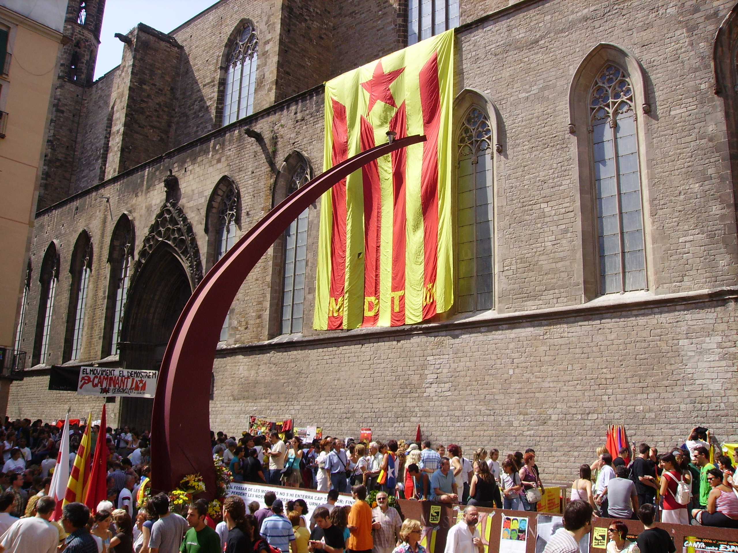 11 de Setembre al Fossar de les Moreres, Barcelona, Catalunya.